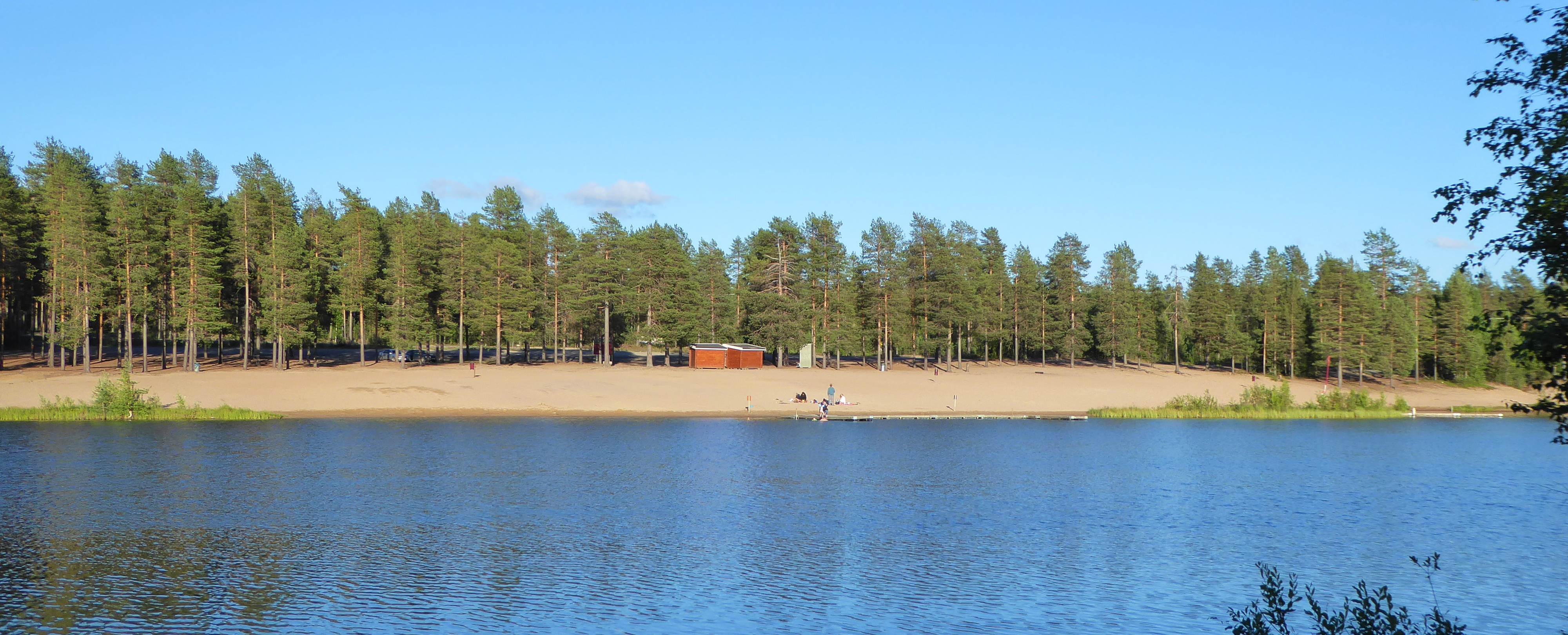 Aldersjön i Boden sommaren 2017. Badplatsen är en så kallad EU-badplats. På badplatsen finns bryggor, omklädningsrum och torrtoalett.